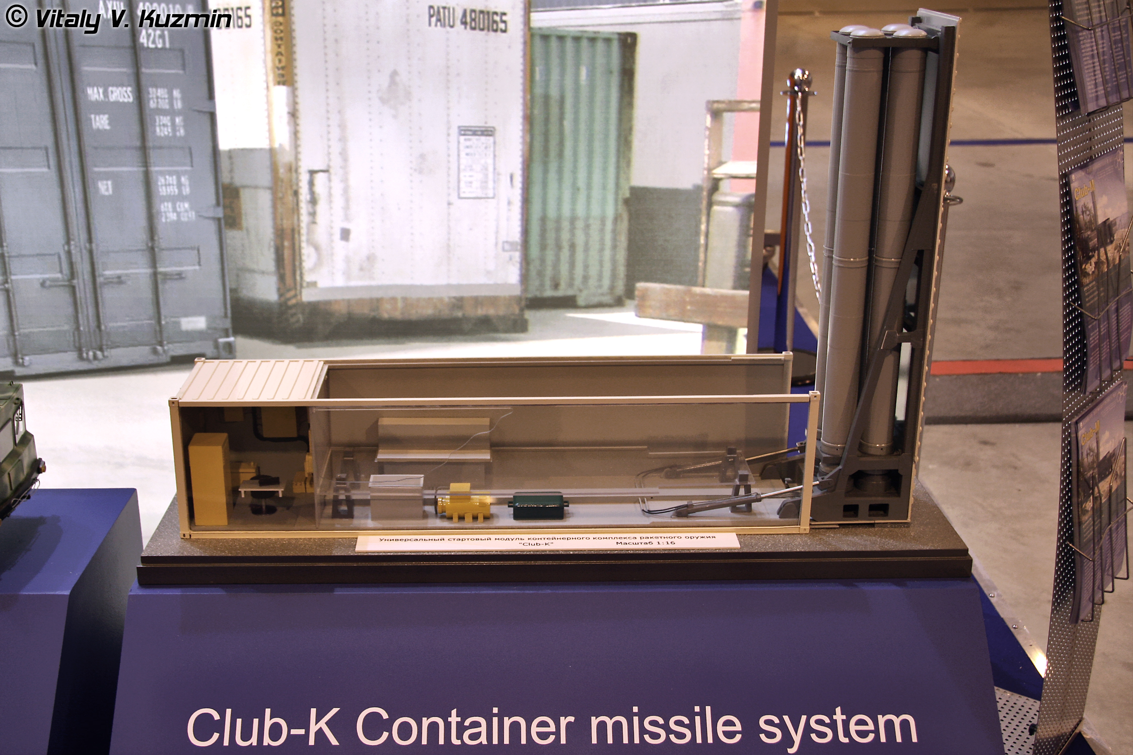 Контейнерный комплекс ракетного оружия Club-K (Club-K container missile system)